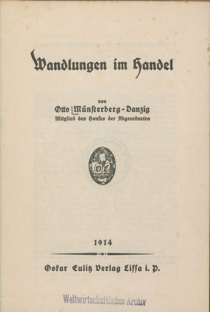 Otto Münsterberg Wandlungen im Handel 1914 Einband Oskar Eulitz Verlag GmbH, Lissa i P